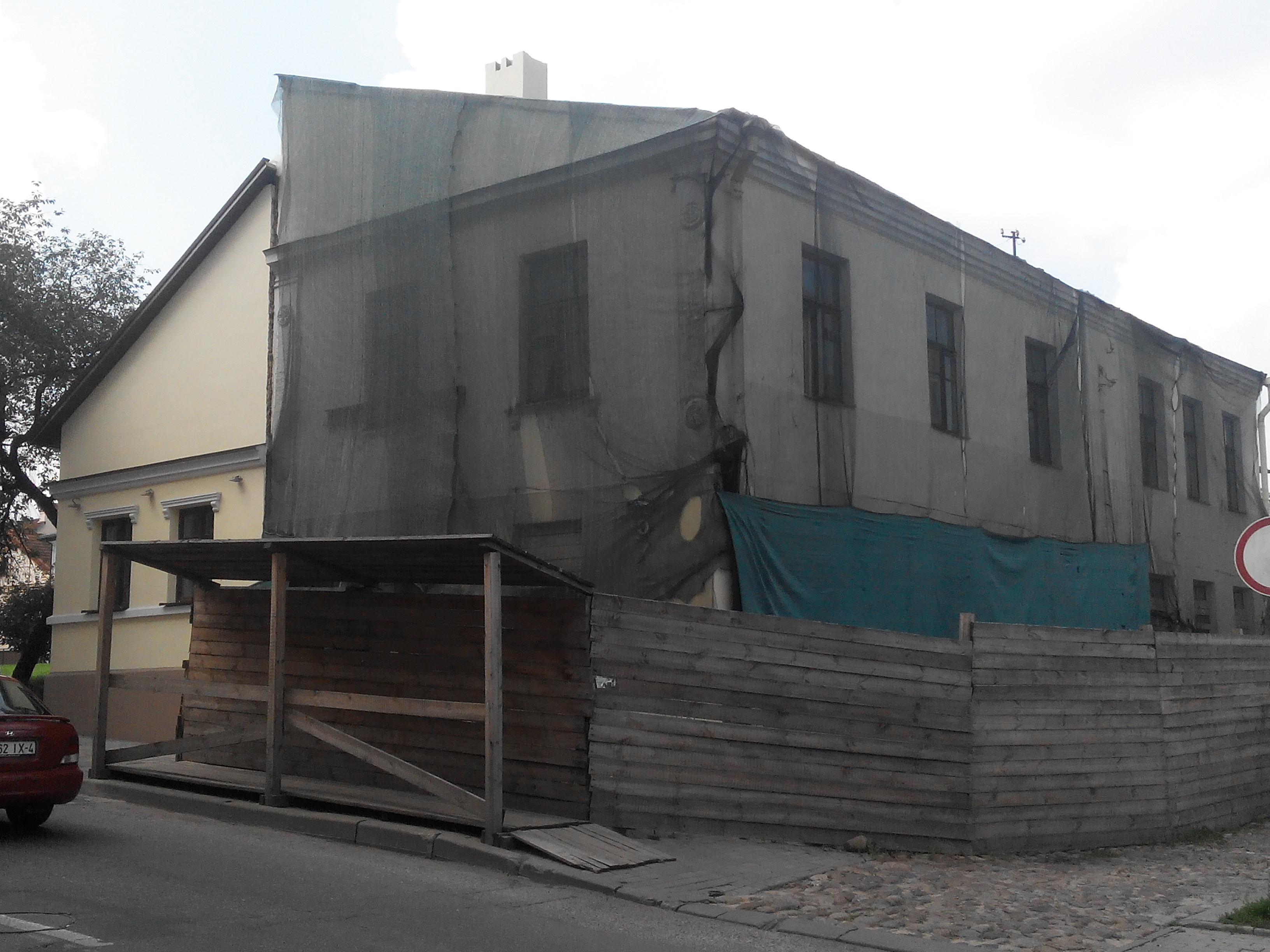 Фота будынка па вуліцы Вялікая Траецкая, 3, у Гродне, Беларусь